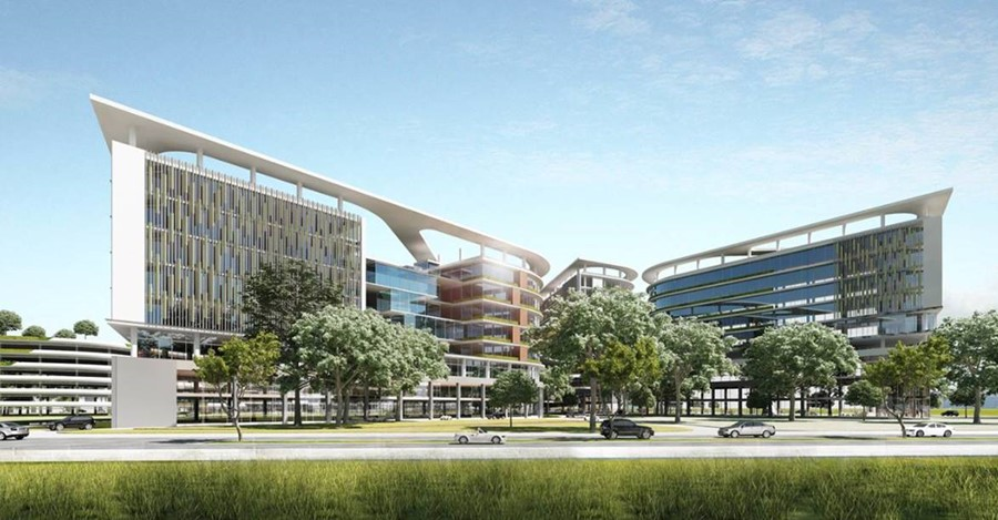 Dự án Xây dựng Trường Đại học Y khoa PHẠM NGỌC THẠCH